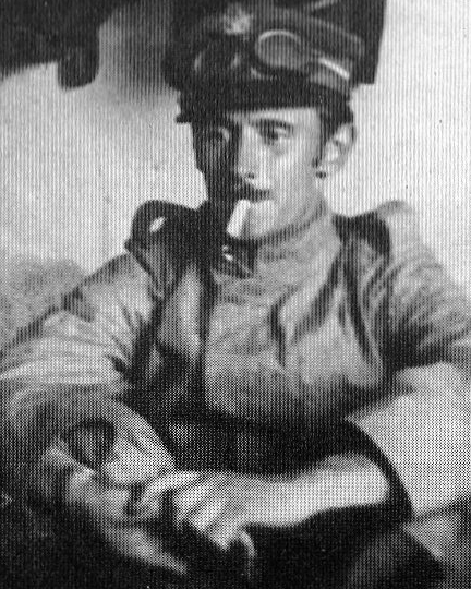 Carlo Erba ritratto nella polveriera di Peschiera, 1915 particolare di ritratto fotografico di gruppo